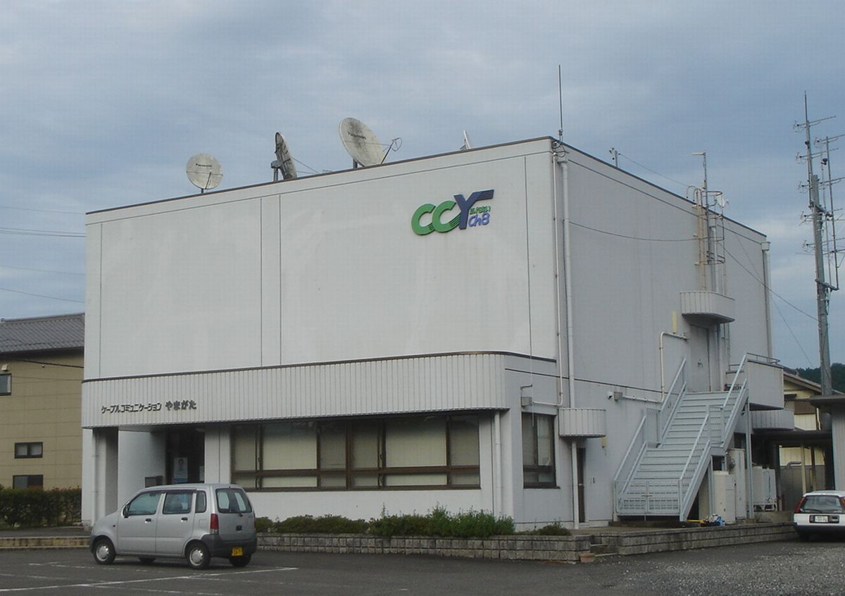 Cable Communication Yamagata（山県市有線テレビ局）,Yamagata,Gifu,Japan(岐阜県山県市)で撮影。